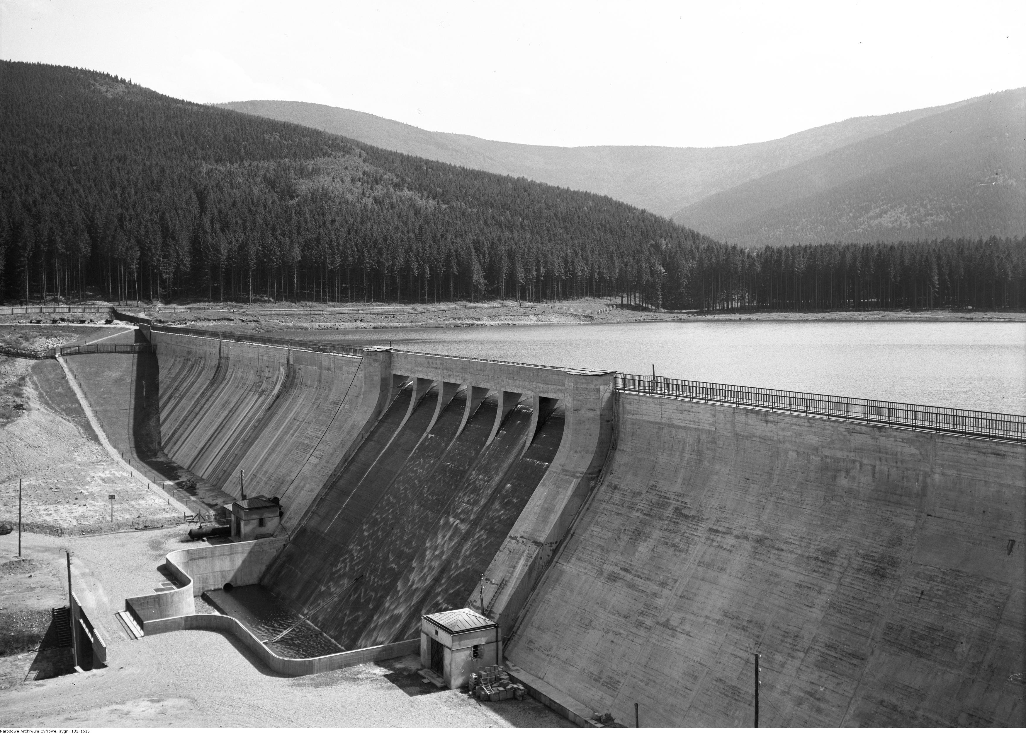 Klauza w dolinie Ludwiki.